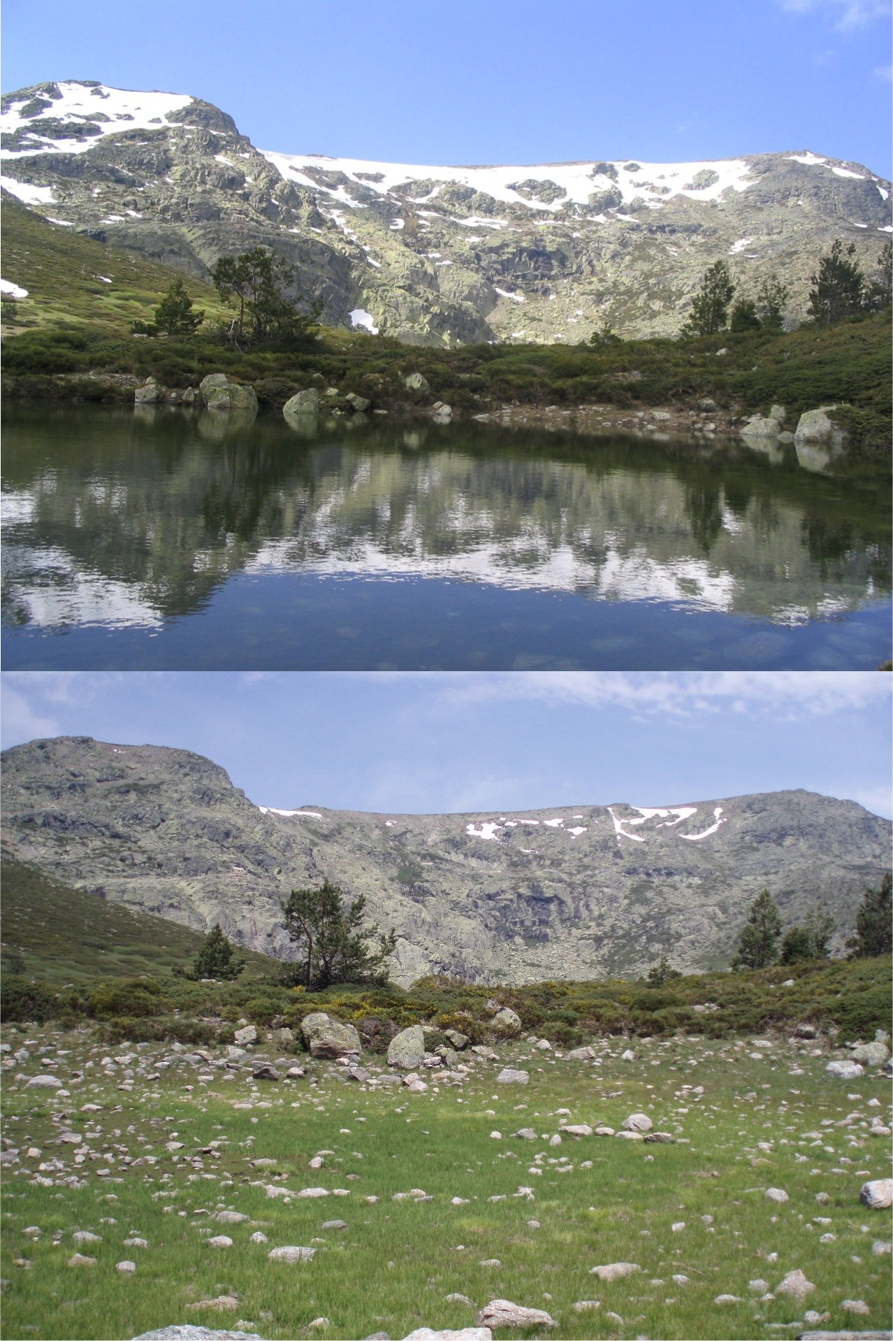 Laguna de origen glaciar con agua intermitente. Está ubicada en el Parque Natural de Peñalara (Comunidad de Madrid, España). Las dos imágenes son de la misma laguna. La fotografía superior está tomada el 30 de abril (durante el deshielo) y la de abajo el 9 de junio.